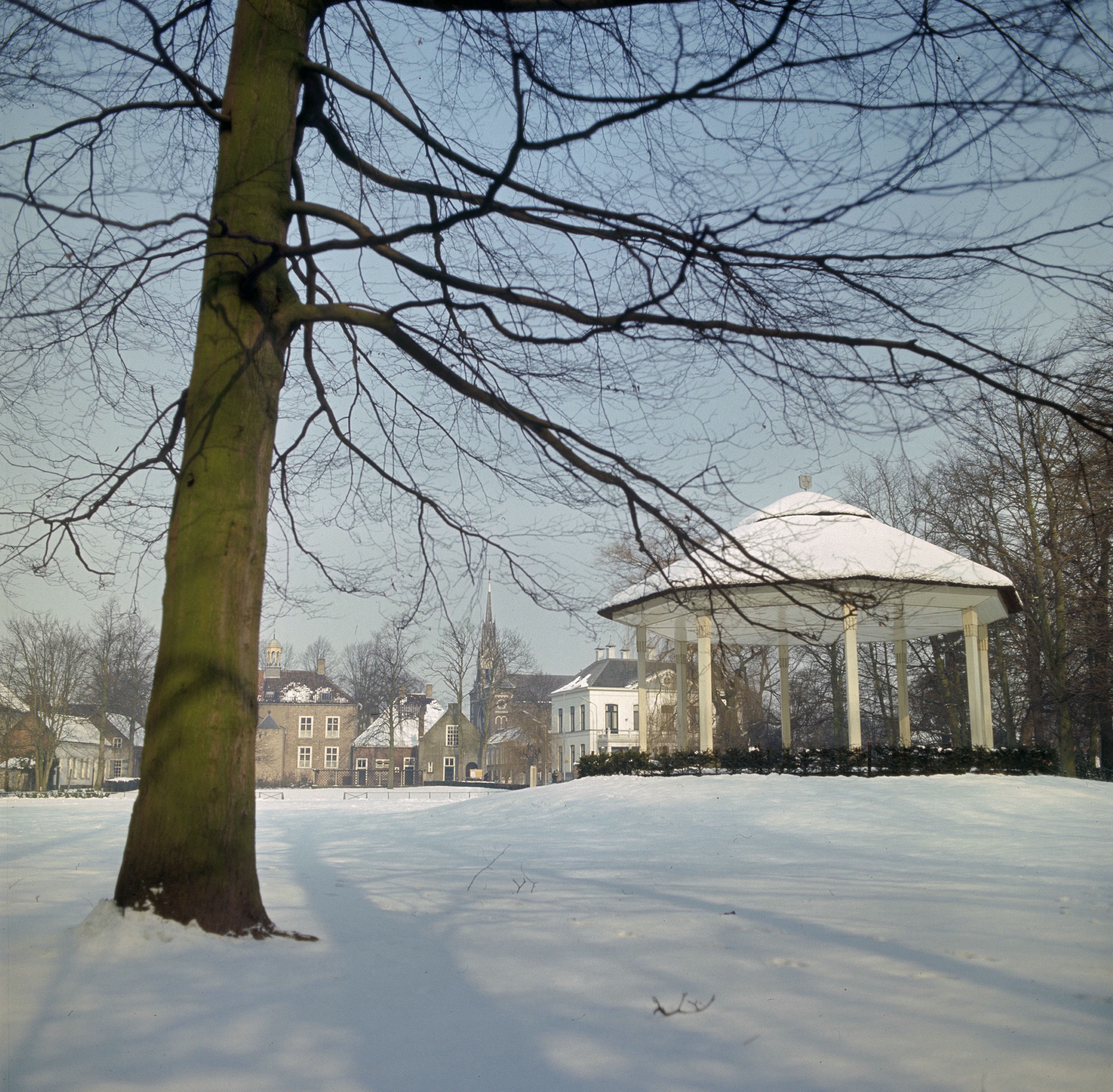 Muziektent/ Park: Overzicht van de muziektent in het Slotpark